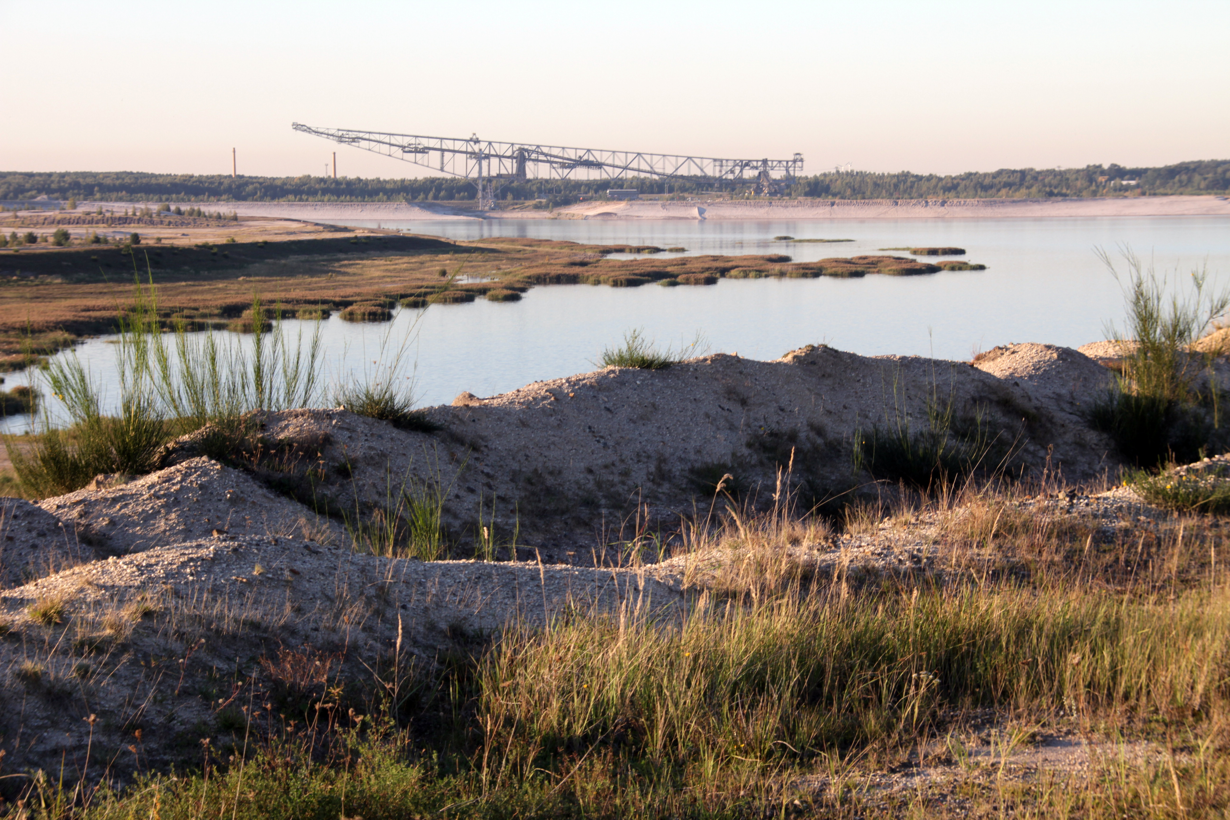 Eines der größten Gebiete der NABU-Stiftung Nationales Naturerbe, der ehemalige Braunkohletagebau Grünhaus in der Lausitz; das Gebiet der Stiftung beträgt circa 2000 Hektar. Es soll sich zur Wildnis entwickeln. Wölfe sind schon fotografiert worden..